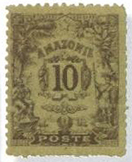 "Марка" виртуального государства Амазония